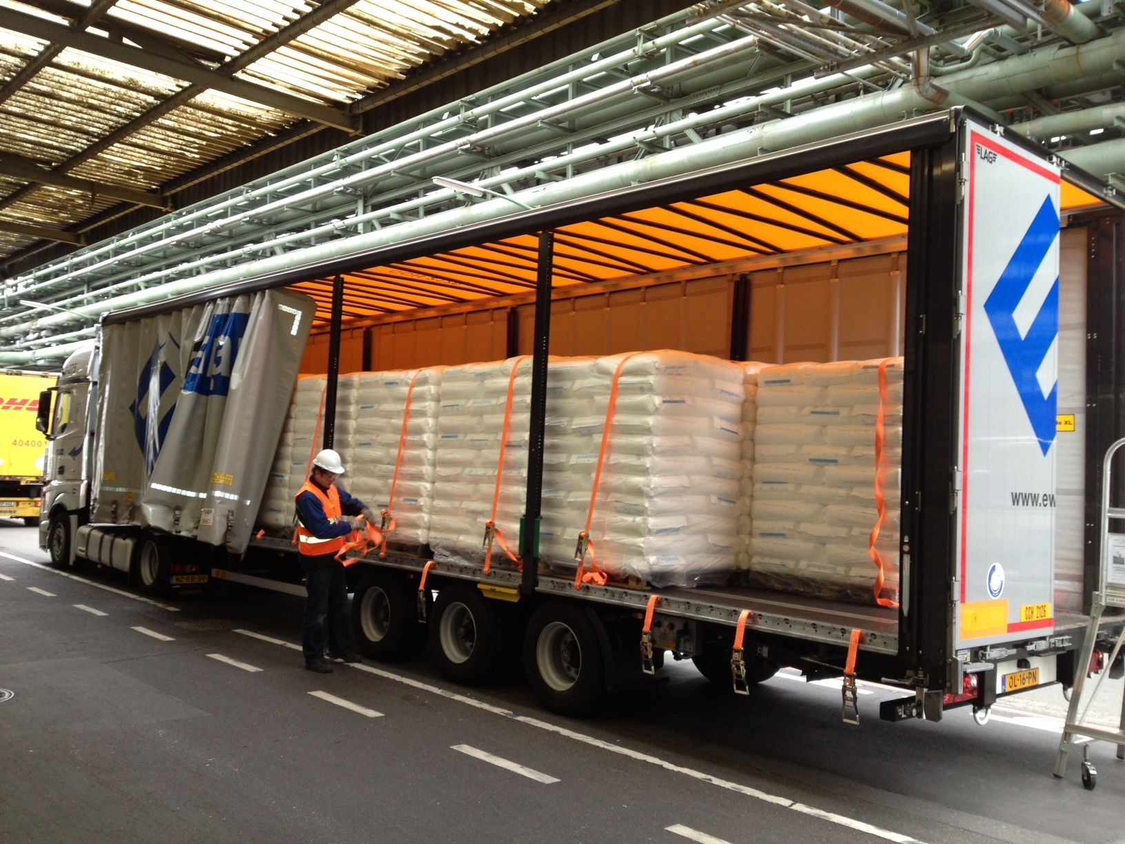 De Mega Trailer (ook wel Mega oplegger)